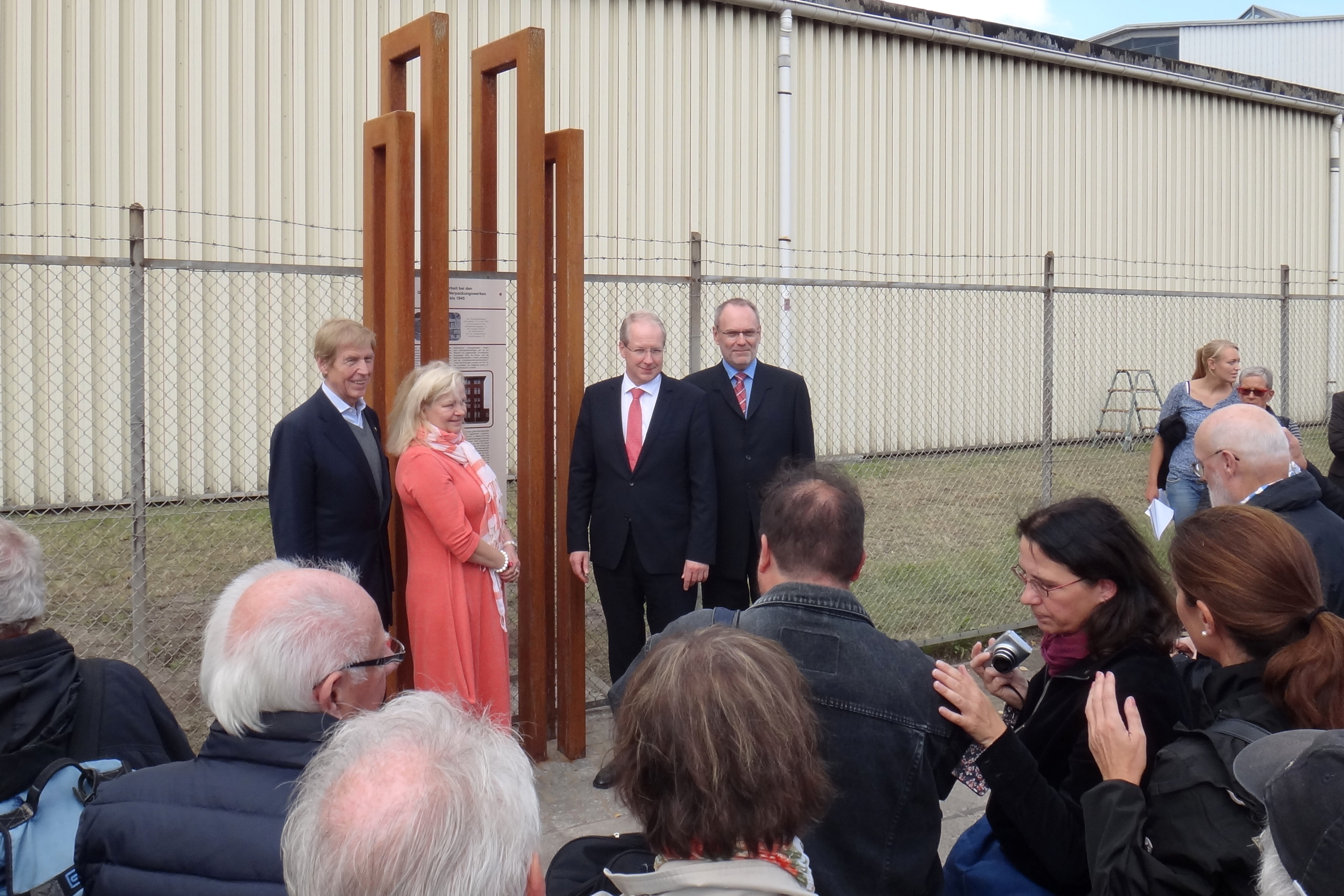 Einweihung des Mahnmals zur Erinnerung an die Zwangsarbeiterinnen und Zwangsarbeiter bei der ehemaligen Firma Günther Wagner Verpackungswerke in der Hansastraße in Hannover. Von links nach rechts: Dr. Horst Meyer (Gegen das Vergessen ./. NS-Zwangsarbeit e.V.), Edeltraut-Inge Geschke (Bezirksbürgermeisterin Stadtbezirk Nord Hannover), Stefan Schostok (Oberbürgermeister Stadt Hannover), Jochen Hundt (White Cap Deutschland GmbH)